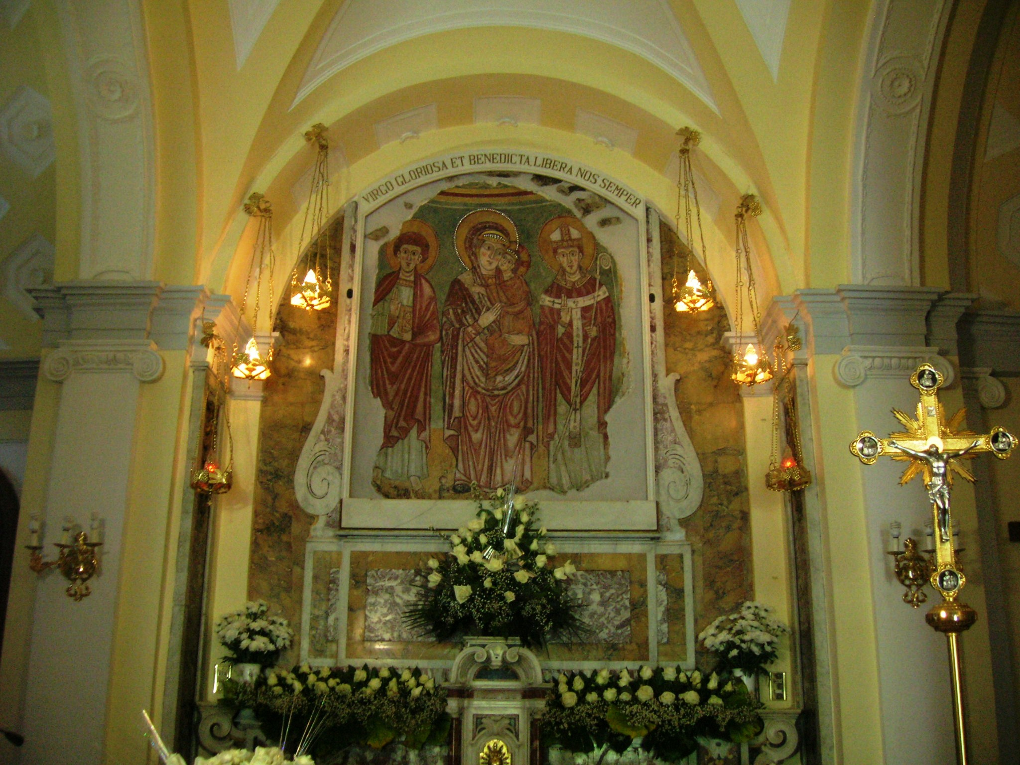 Santuario della Madonna della Libera a Castellammare di Stabia